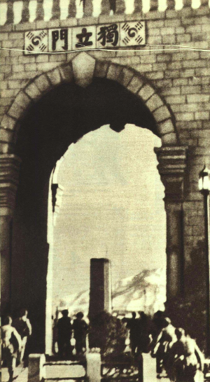 195103 1950年朝鲜战争中国志愿军攻入汉城独立门